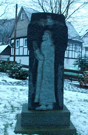 Johann Heinrich Montanus Denkmal in Schmallenberg-Bödefeld (drei Tonnen schweres Standbild, geschaffen von Steinmetzmeister Ulrich Steinmetz aus Lenne)